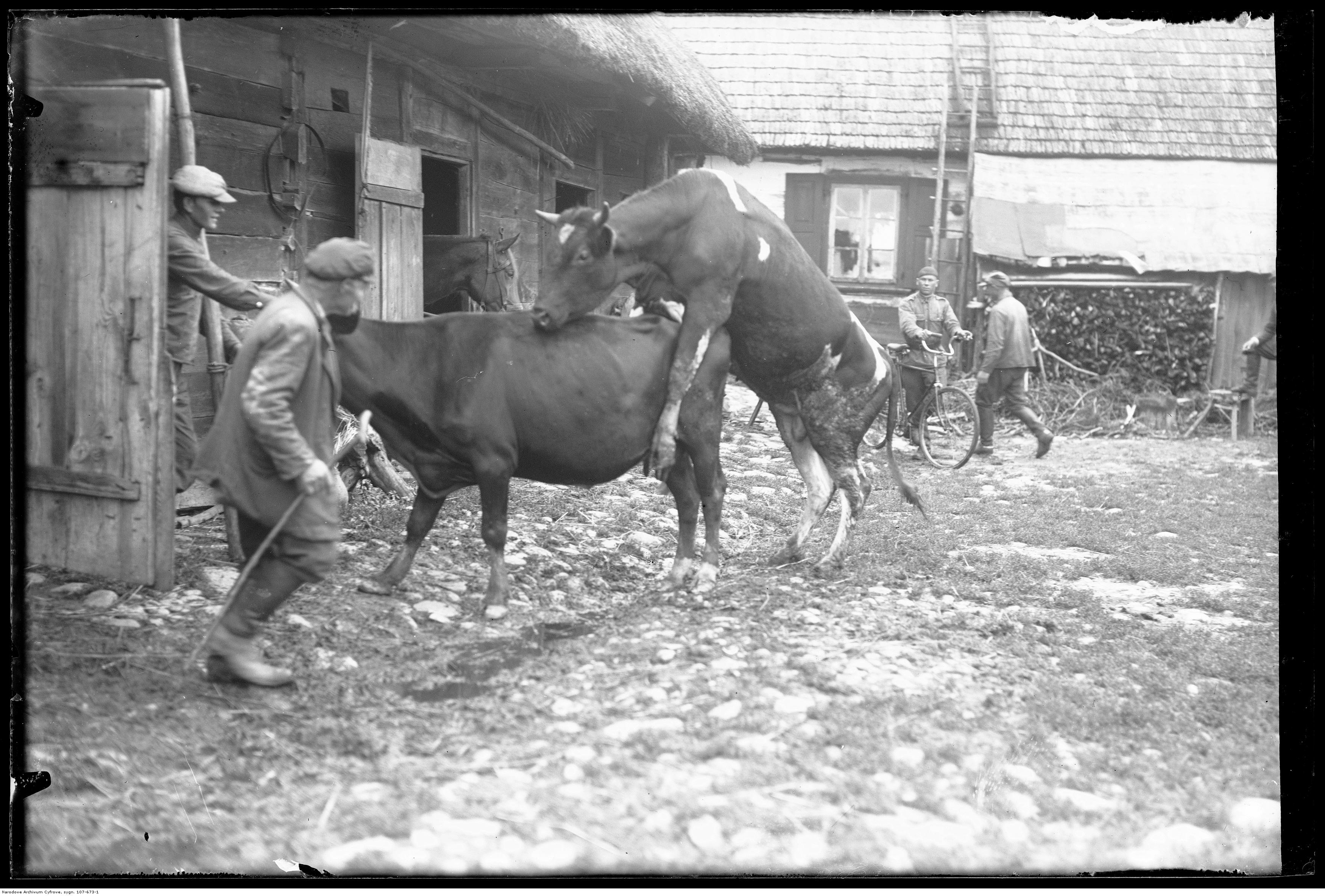 Zasiew cielęcego nasienia.